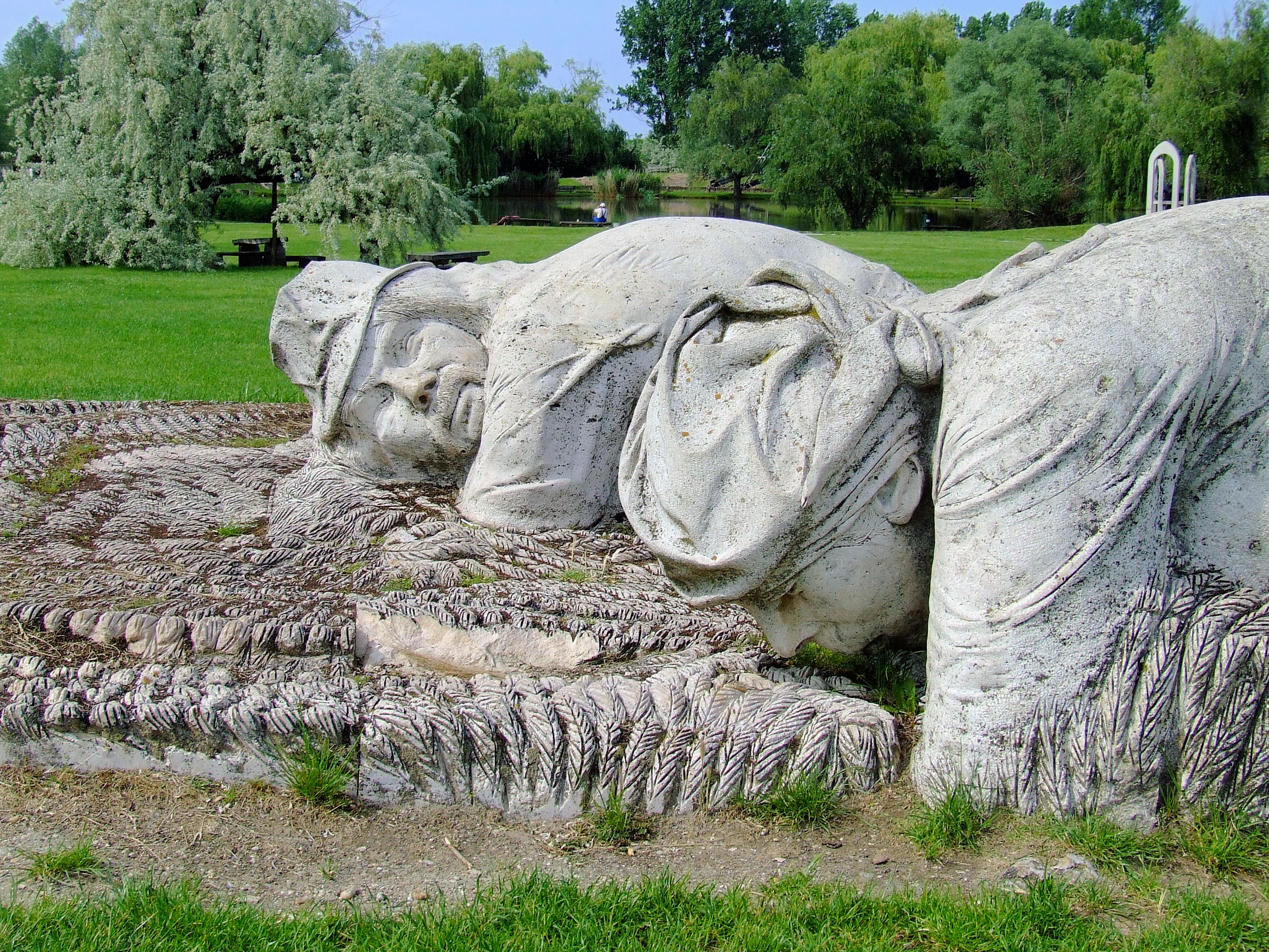 Földműves emlékmű. Ópusztaszeri Nemzeti Történeti emlékpark. Melocco Miklós alkotása (1986)